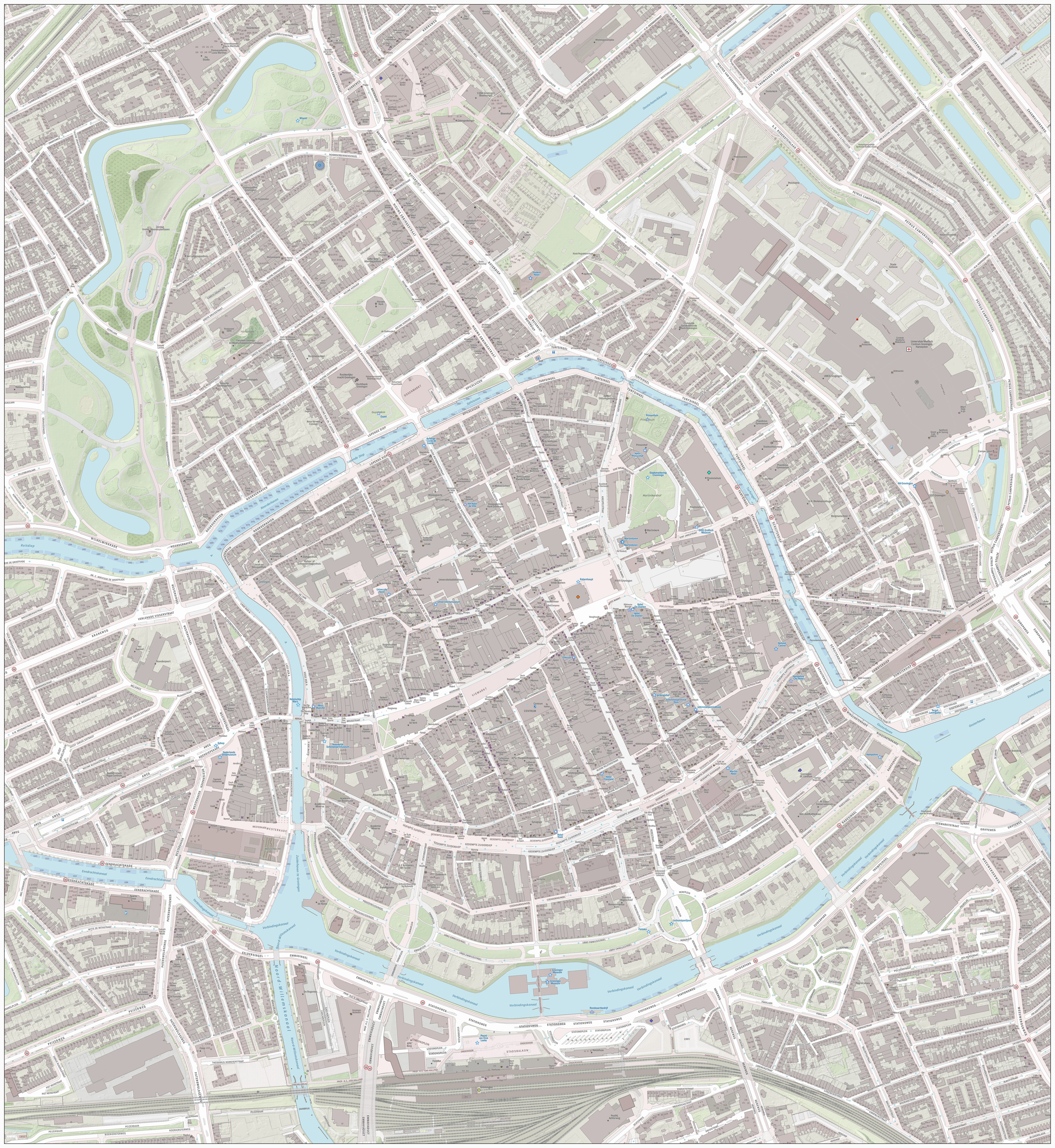 Topografische kaart van Groningen (centrum van woonplaats). Resolutie: 2688 pixels/km. Kaartbeeld samengesteld uit de open geodata van de Basisregistratie Grootschalige Topografie (BGT), Creative Commons-BY Kadaster, en Top10NL en Top25namen (Basisregistratie Topografie, Kadaster), Creative Commons-BY Kadaster. Gebouwvlakken uit open geodata BAG extract, Creative Commons-BY Kadaster. Wegen uit de OpenStreetMap, CC-BY OpenStreetMap bijdragers. Reliëfschaduw uit de Actuele Hoogtekaart AHN2/AHN3. Samenstelling en kleurenschema: Jan-Willem van Aalst, met QGIS2. Zie ook de Legenda.